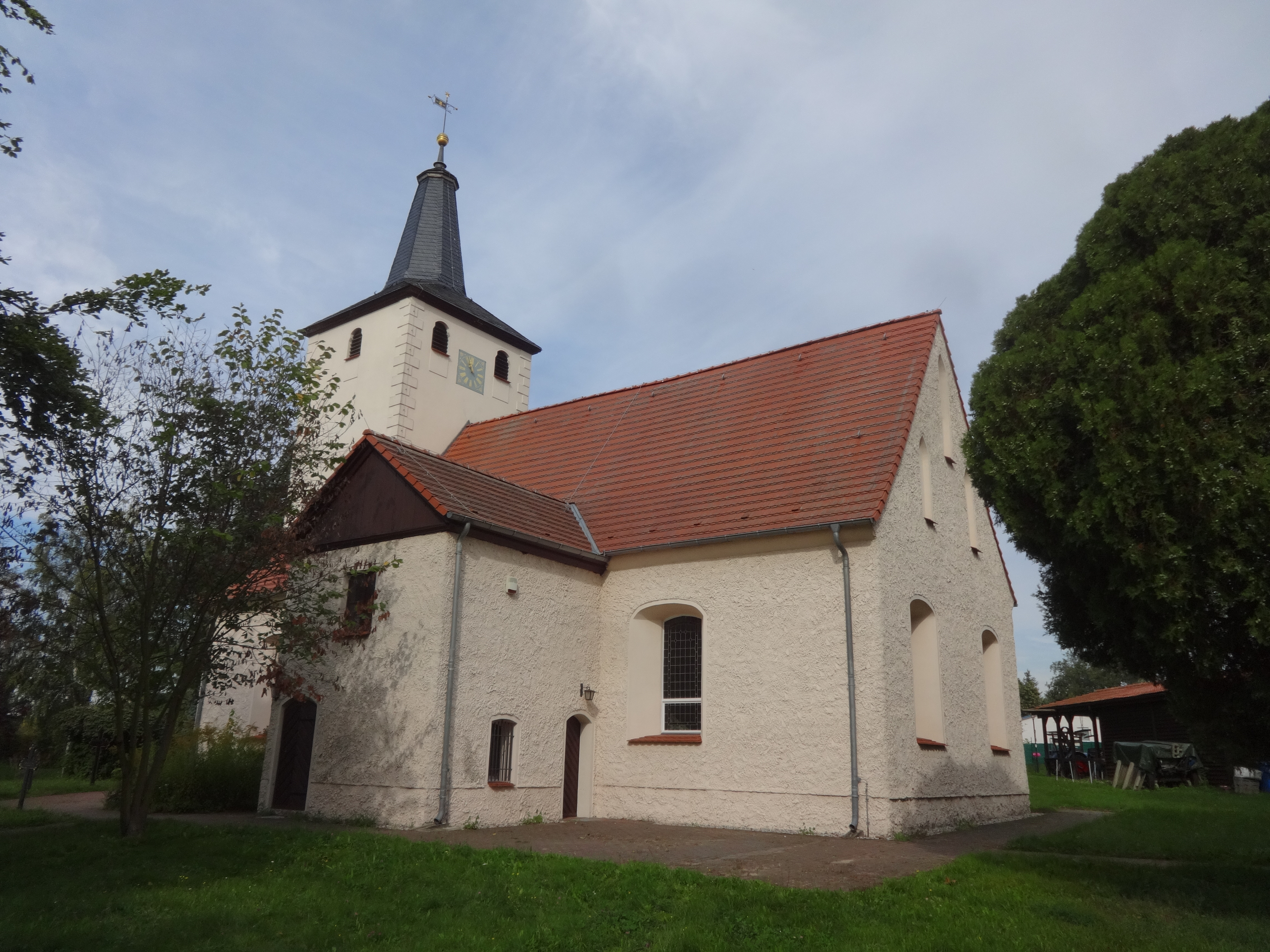 Die Feldsteinkirche in Diedersdorf in der Gemeinde Großbeeren entstand vermutlich in der ersten Hälfte des 14. Jahrhunderts. In den Jahren 1710 und 1712 errichtete die Kirchengemeinde den Dachturm aus Fachwerk und vergrößerte den südlichen Logenanbau. Im Innern stehen unter anderem eine Kanzel und eine Fünte aus dem Ende des 19. Jahrhunderts.